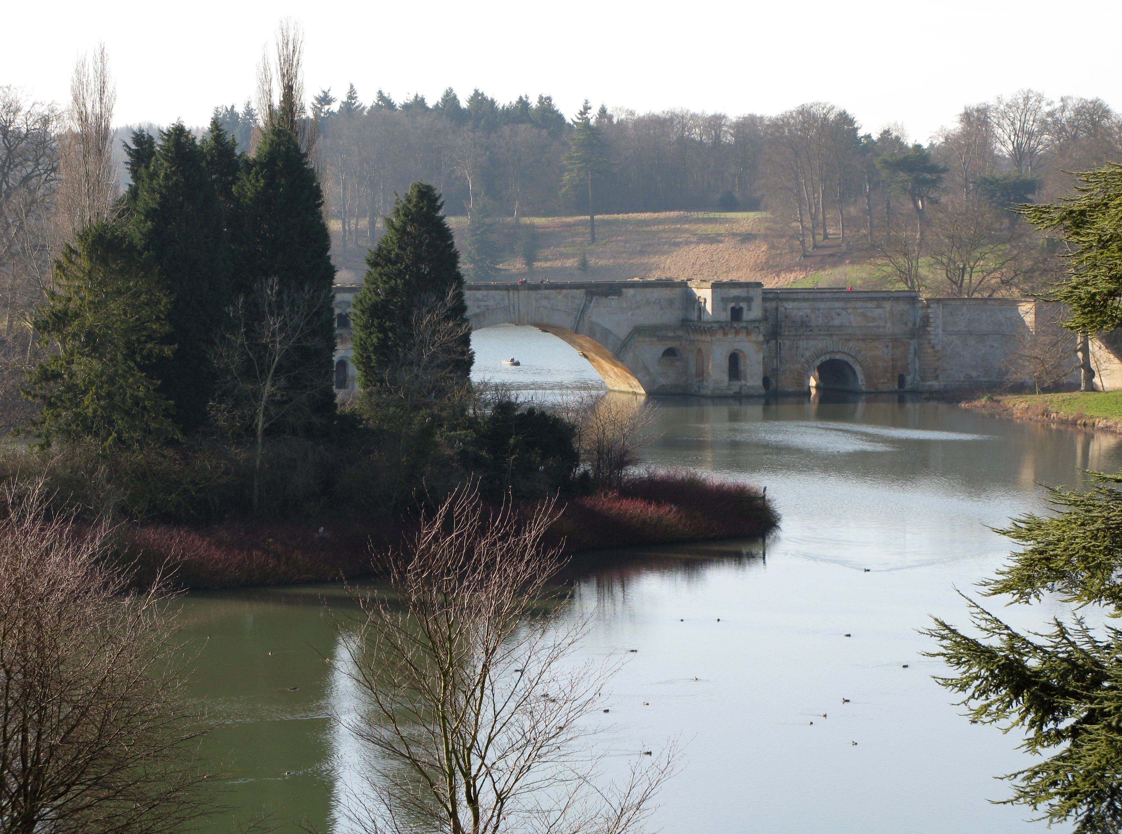 The grand bridge, Blenheim